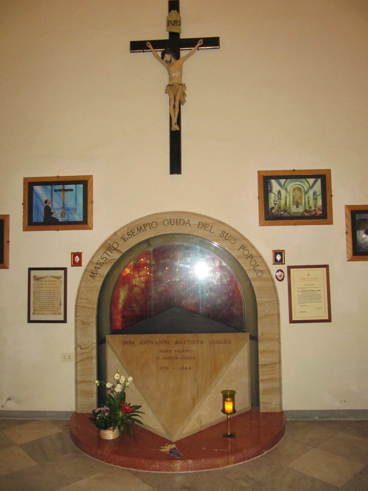 tomba di don Giovanni battista Quilici all'interno dell'istituto santa Maria Maddalena in Livorno